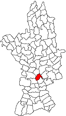 Categorie:Hărţi ale judeţului Olt